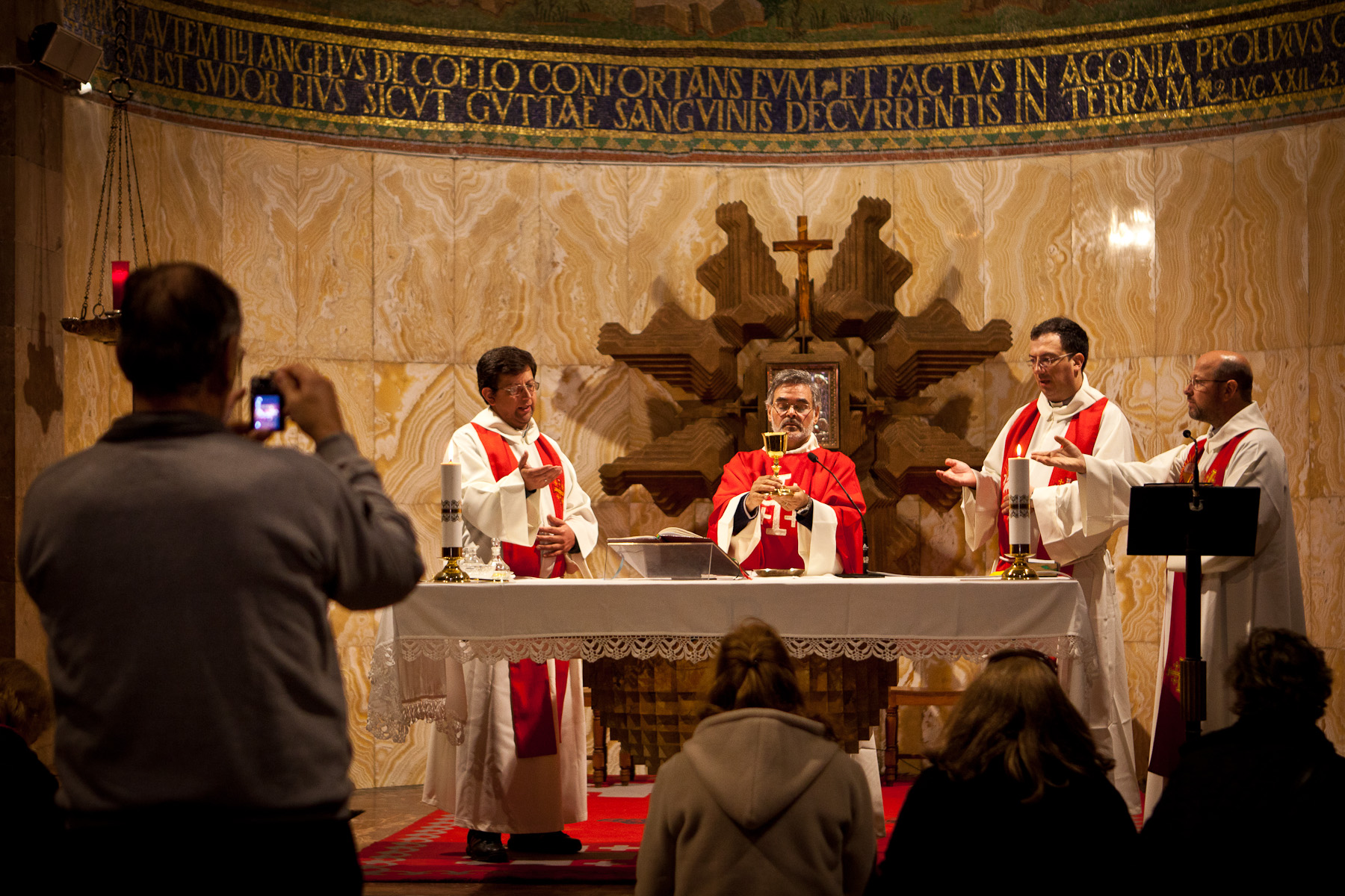 Jerusalem